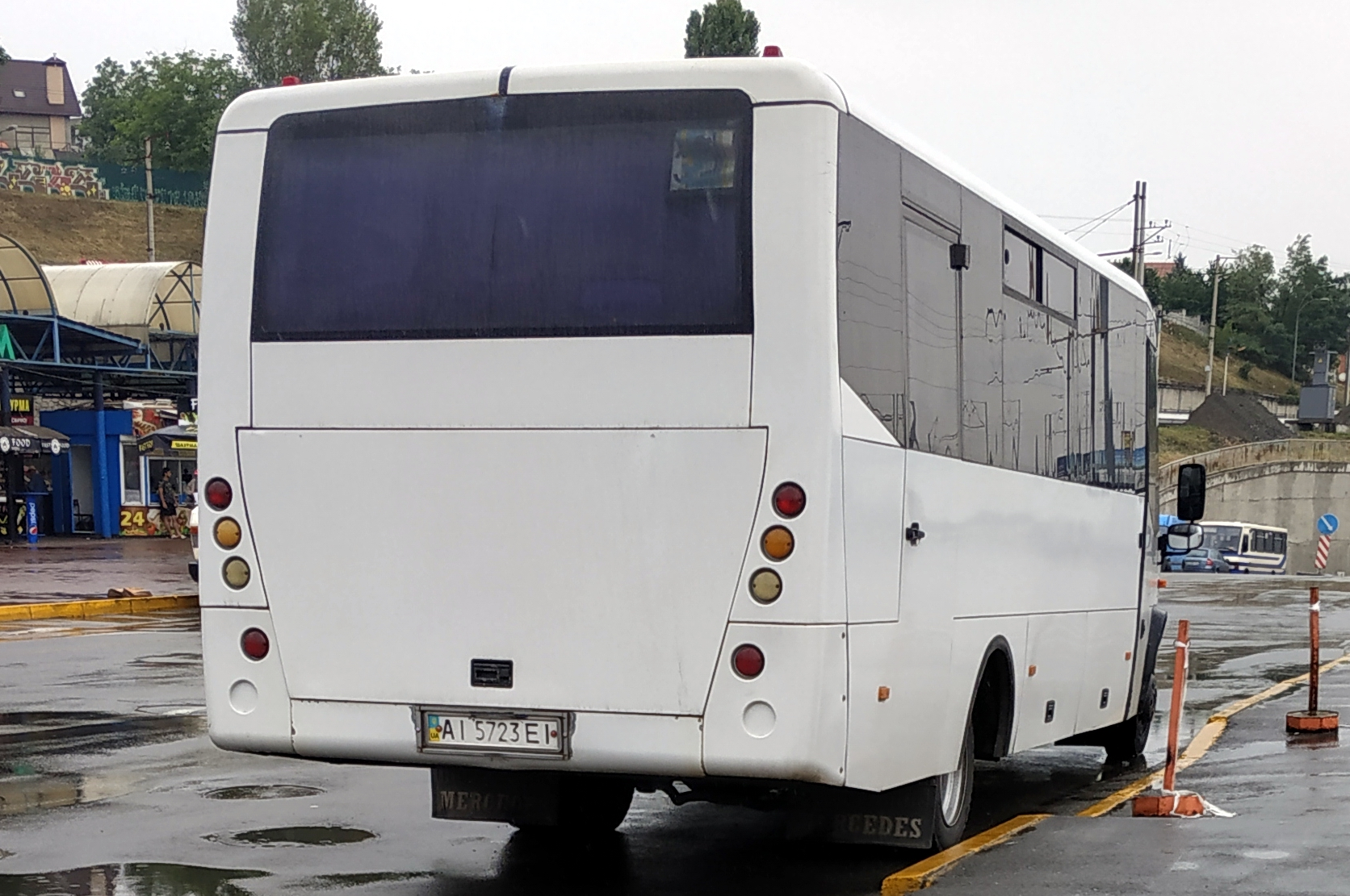 Автобус Стрый-Авто А-07562, Киев, автостанция Выдубичи, 2019 г.